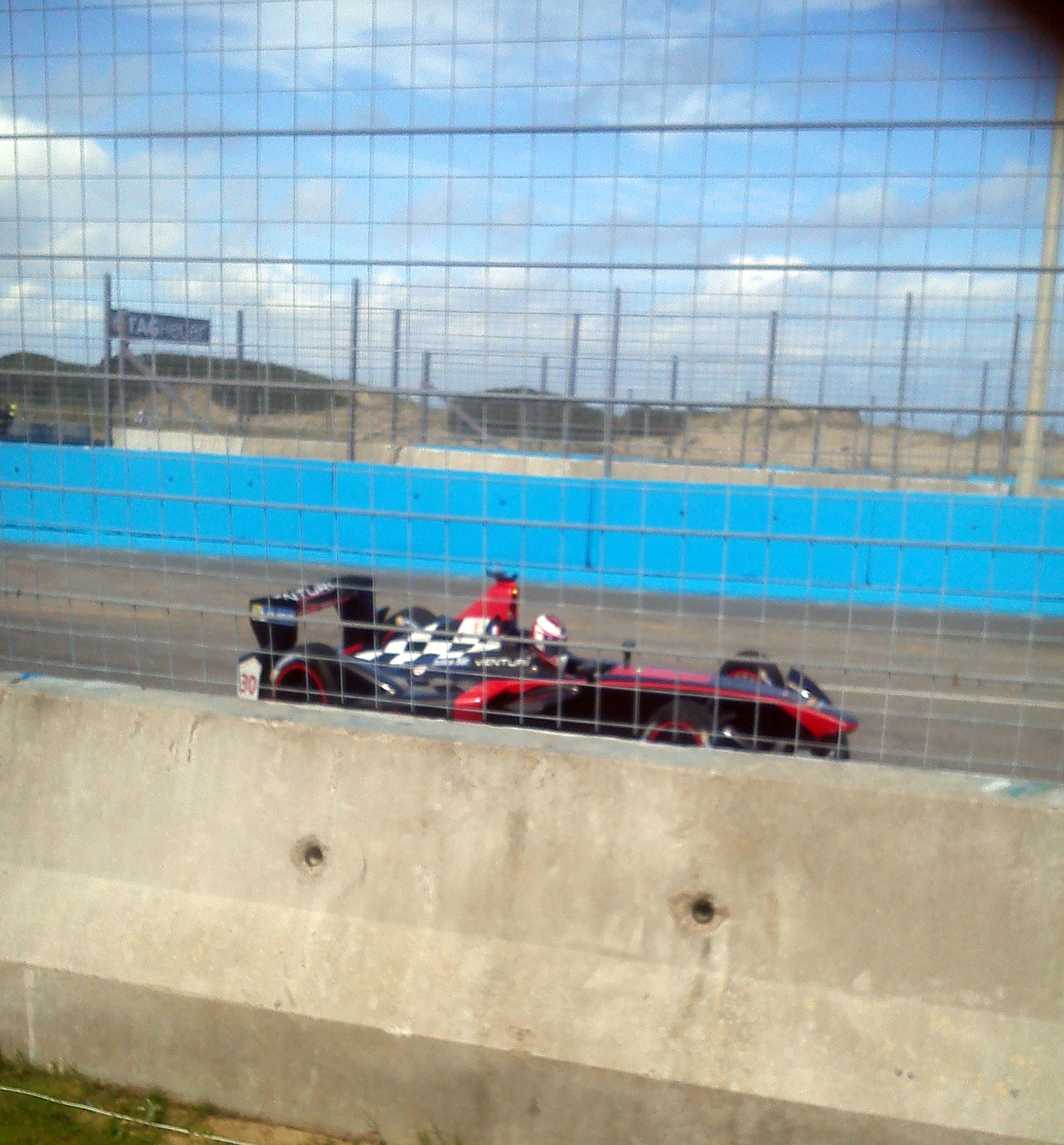 Stephane Sarrazin en el ePrix de Punta del Este del 2014, fecha valida por la Formula E.